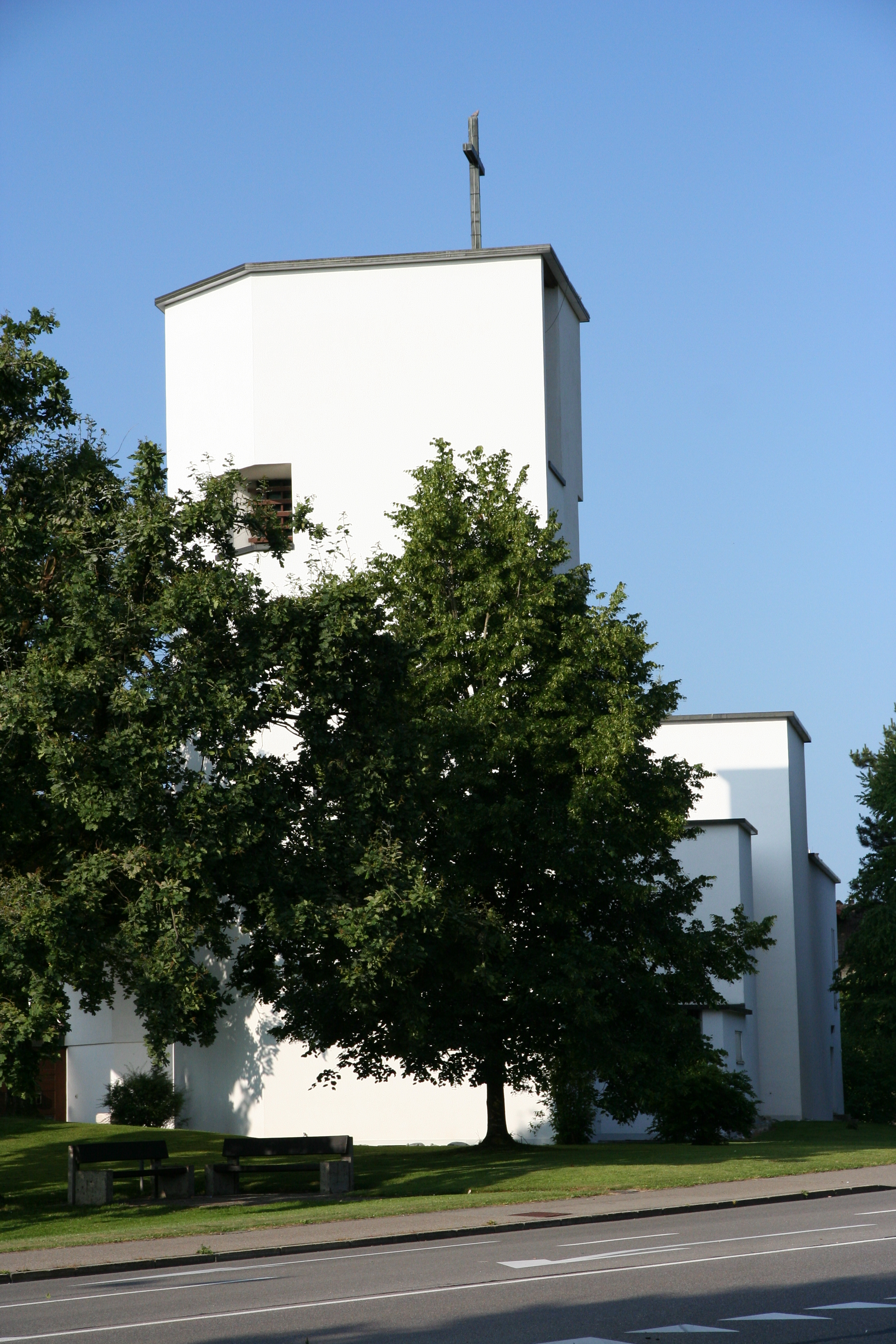 Römisch-katholische Pfarrikirche St. Niklaus Hombrechtikon, Kirchturm